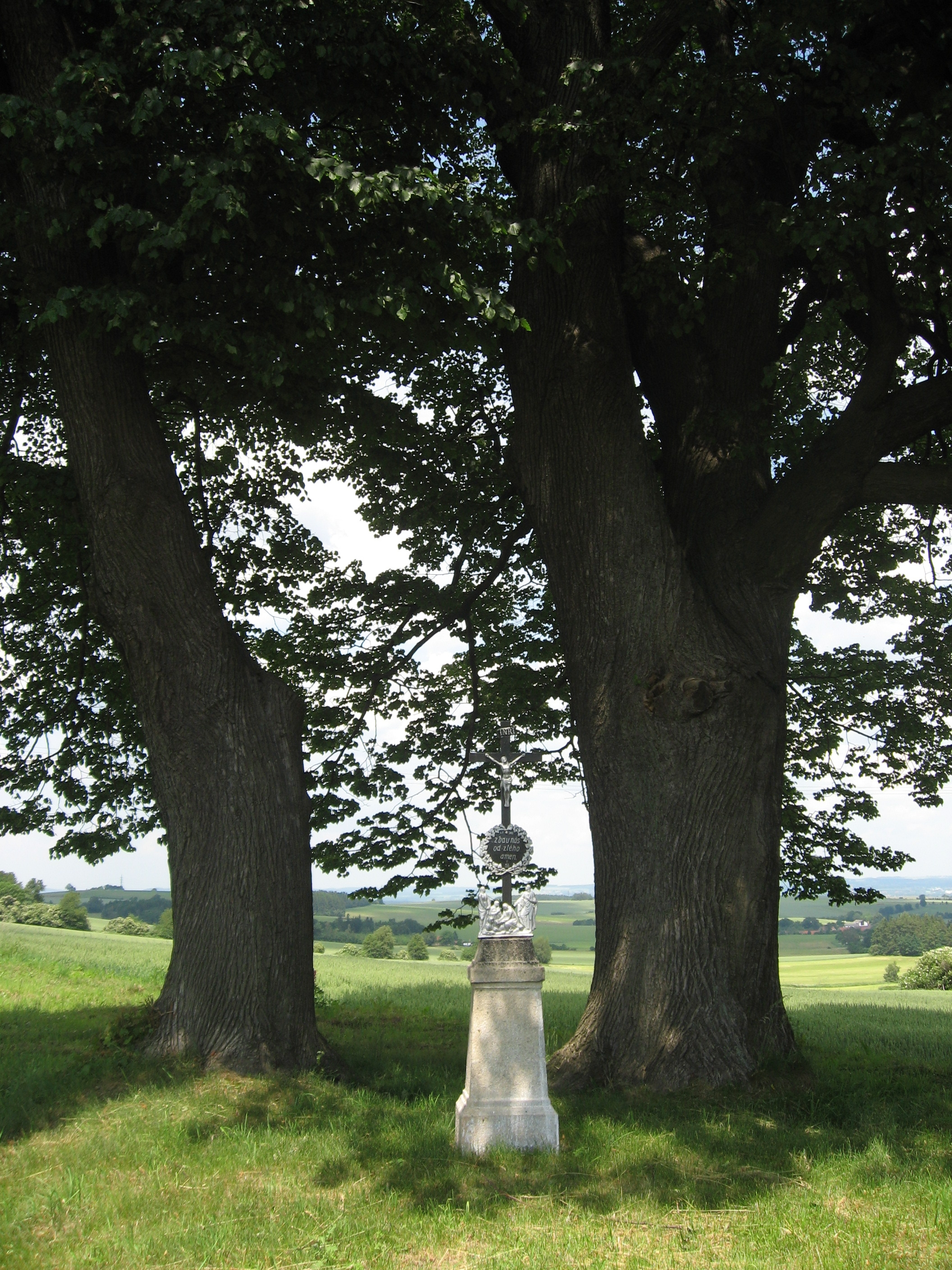 Chyška